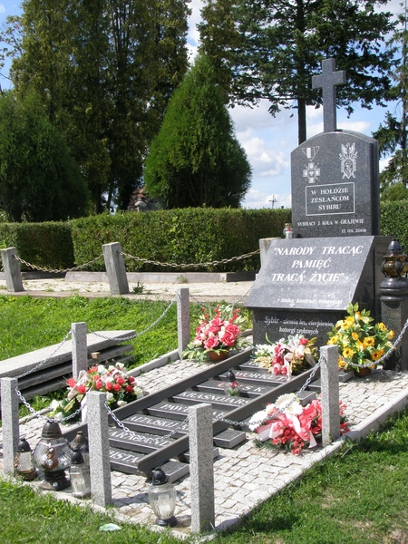 Grajewo - tablica na cmentarzu parafialnym upamiętniająca wywózki mieszkańców Grajewa na Sybir w okresie II wojny światowej